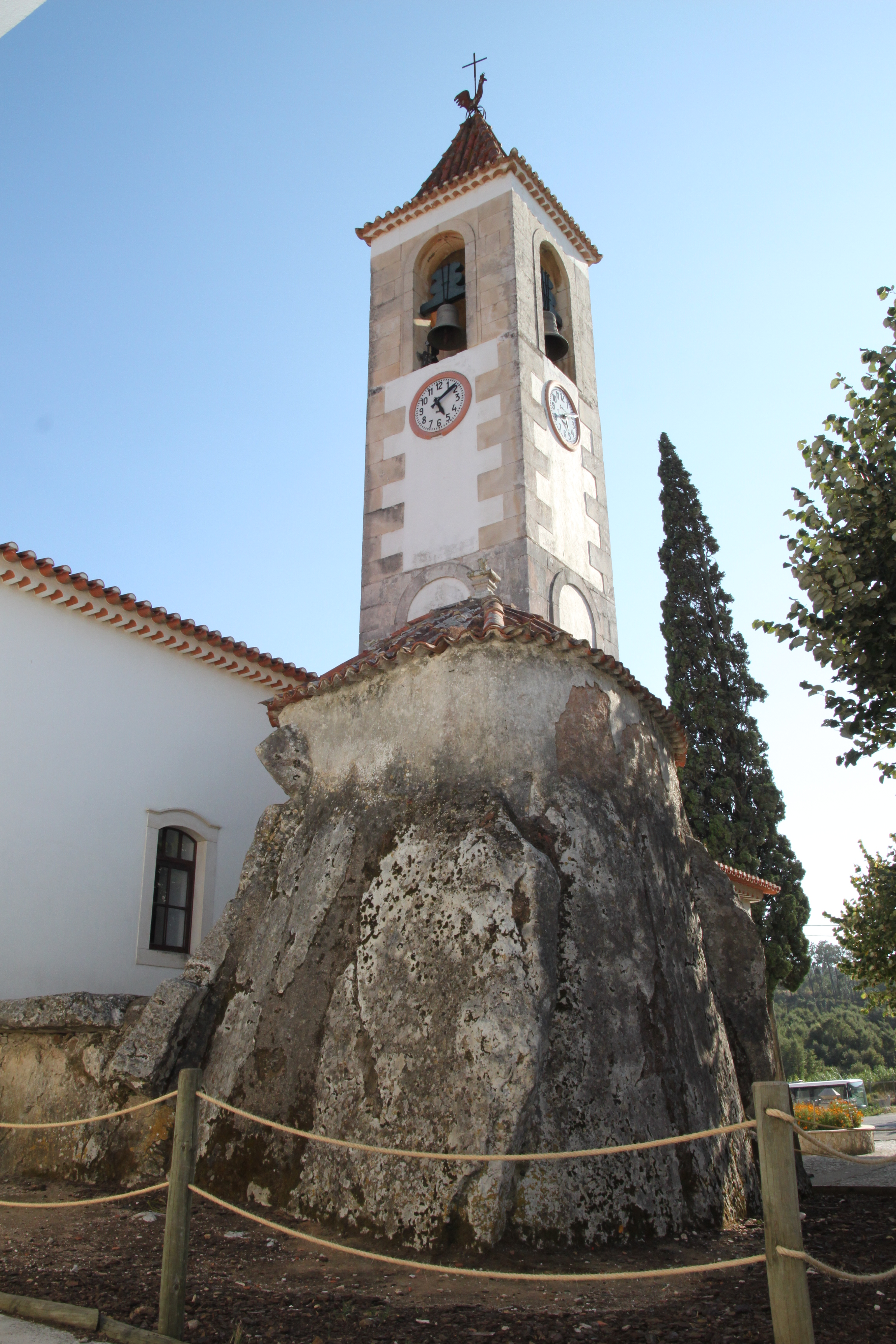 Igreja de Santa Maria Madalena ou Igreja Paroquial de Alcobertas, e megálito-capela adjacente This file was uploaded for Wiki Loves Monuments in Portugal with the unique identifier 72743.